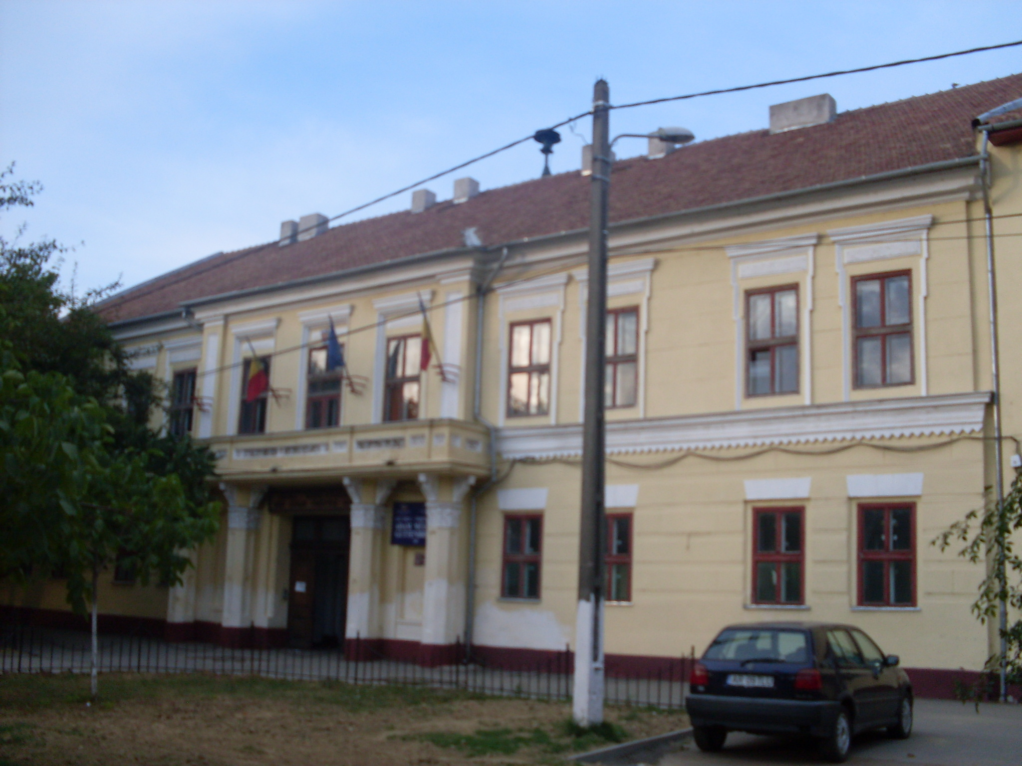 Castelul Nopcea, azi Grupul Școlar Forestier Arad